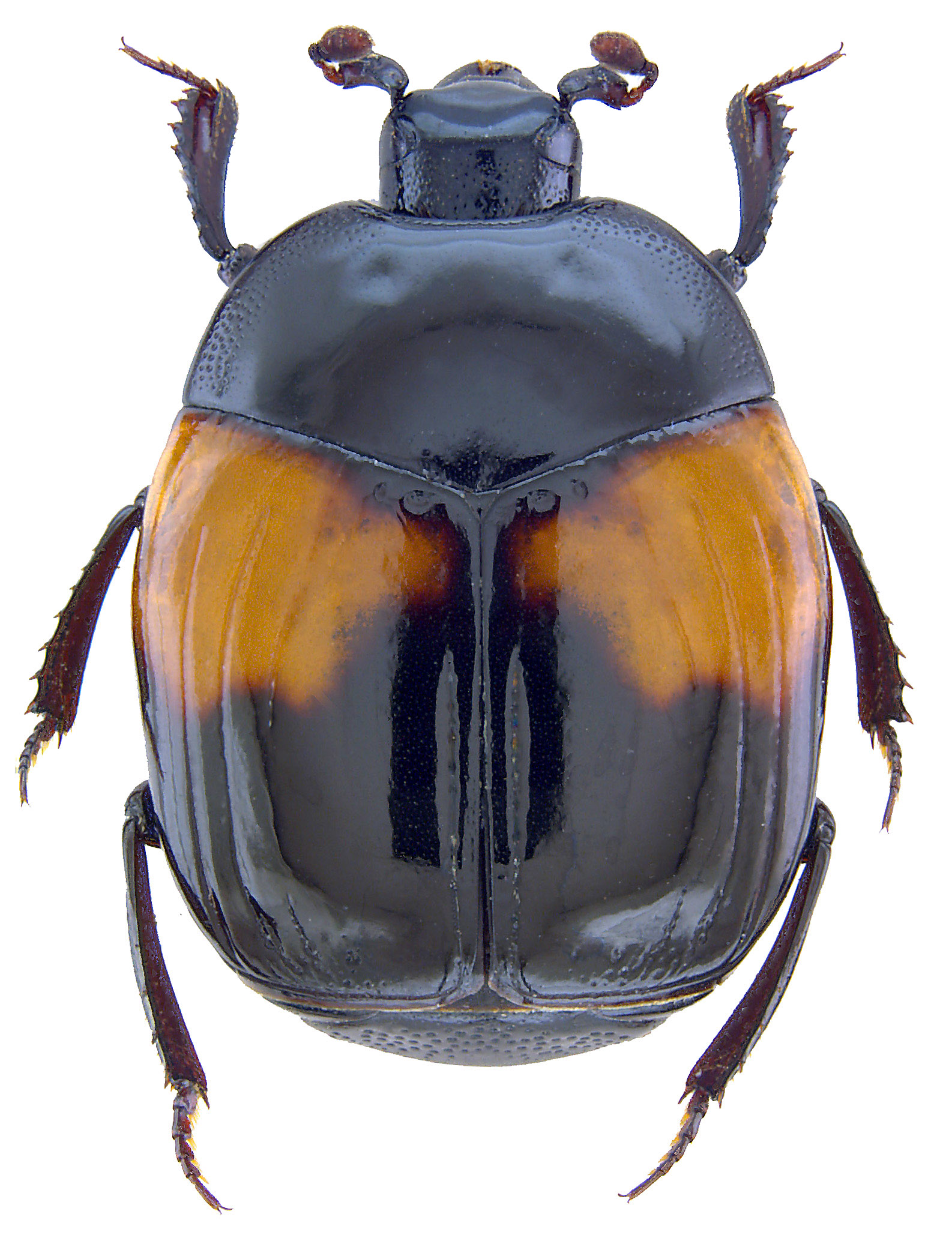 Habitus en vue dorsale d'Asolenus julietteae Gomy, 2014. Photographie d'Henri-Pierre Aberlenc utilisée par Yves Gomy pour décrire cette espèce nouvelle d'Histeridae de Madagascar dans le Bulletin de la Société entomologique de France n° 119 (3) page 313.